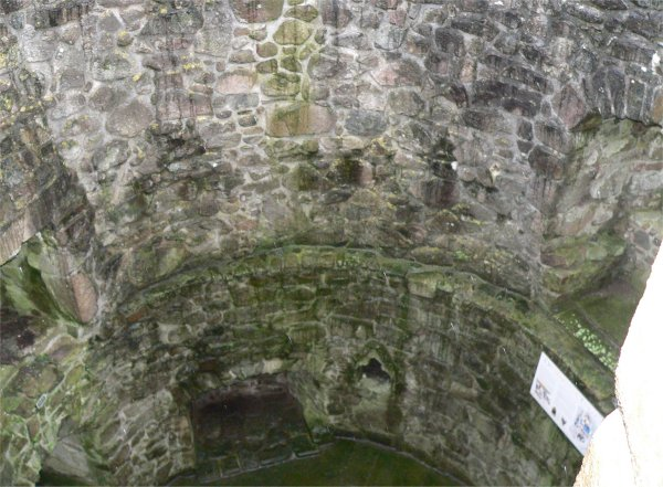 Orchardton Tower, Dumfries and Galloway, Scotland